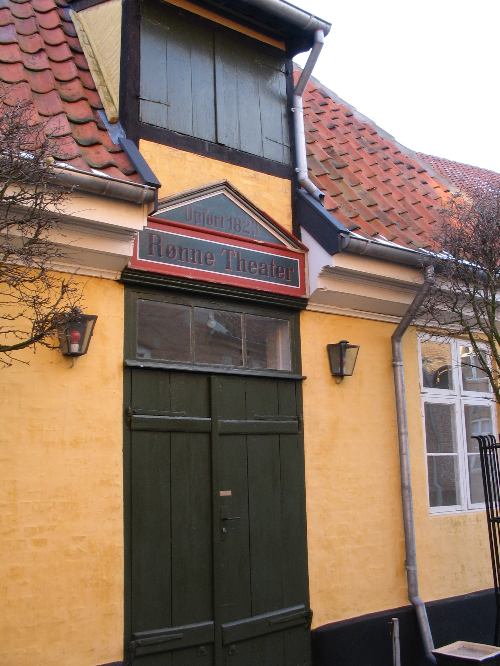 Rønne Theater er et teater der blev opført i 1783 og udvidet i 1823 og ligger på hjørnet af Østergade og Teaterstræde i Rønne på Bornholm. bygning=23542607